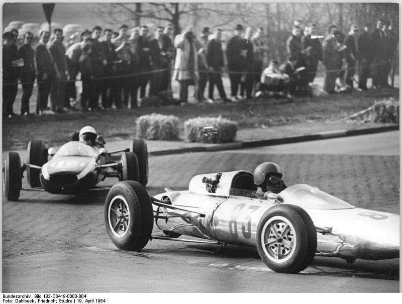 Zentralbild Gahlbeck-Studre 19.4.1964 Internationales Auto- und Motorradrennen auf der Halle-Saale-Schleife am 19.4.1964 mit Fahrer aus 17 Ländern. Am 18.4.1964 wurden noch eifrig Trainingsrunden auf dem Kurs absolviert. UBz. Trainingsrunden der Formel 3, Rennwagen des 1000 ccm der Klasse I. Nr. 83 Frieder Rädlein (DDR) auf Melkus-Wartburg, dahinter der Franzose Jacques Bernusset auf Cooper.